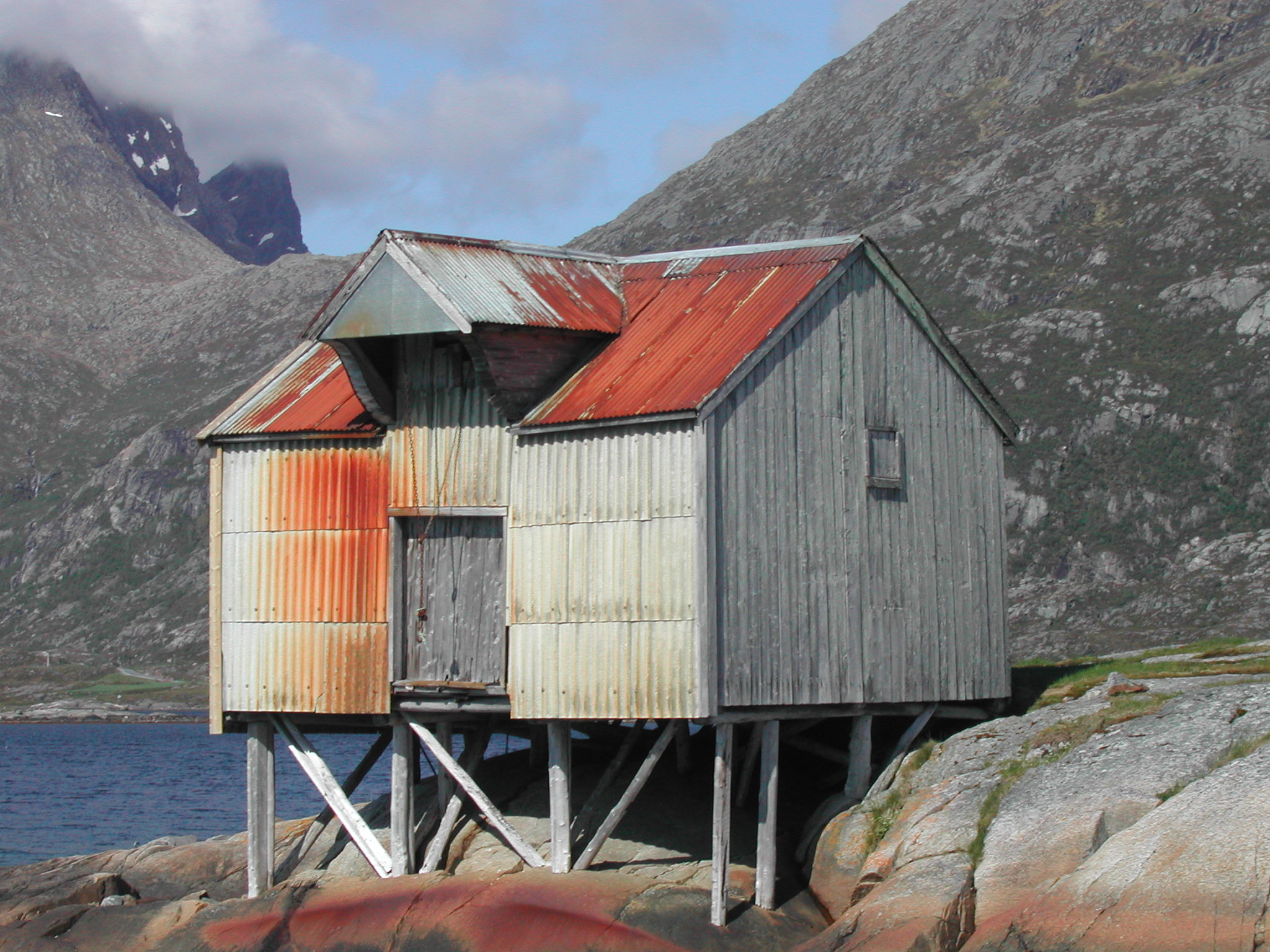 Brygge; d.e. sea house in Helgeland, Norway